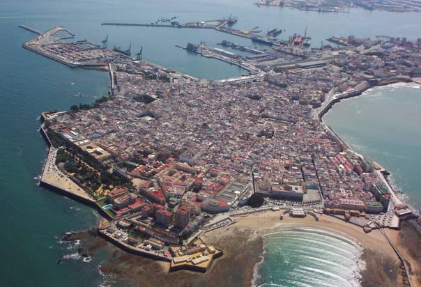 Foto aérea de Cádiz (España)